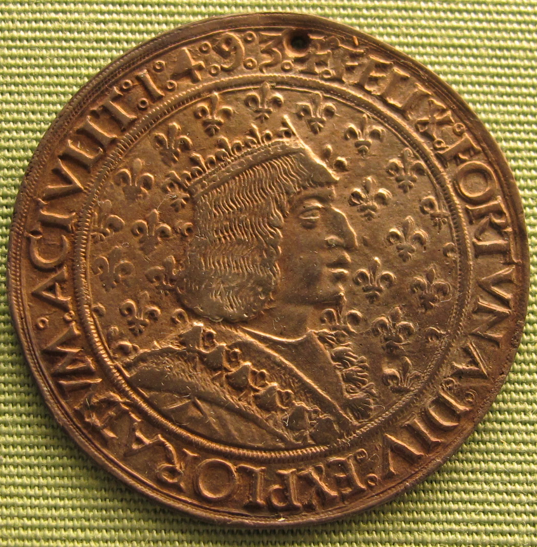 Jean pèreal (disegno) e nicola da firenze, jean e louis lepère, carlo VIII e anna di bretagna visitano lione 1493